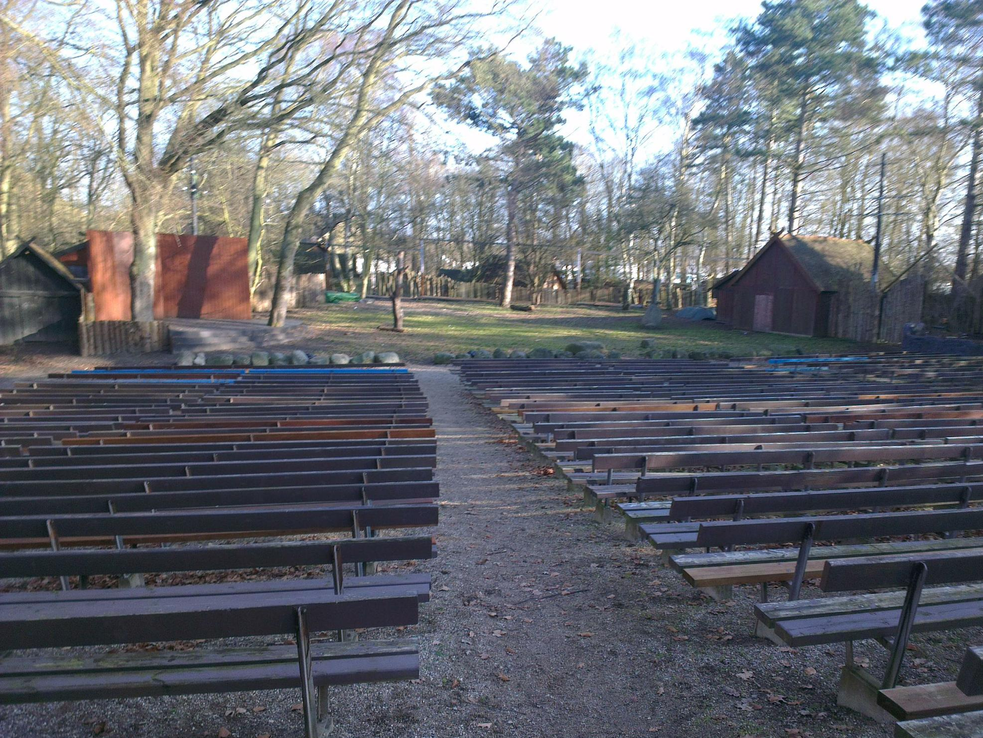 Frederikssund Vikingespil på Kalvøen Frederikssund